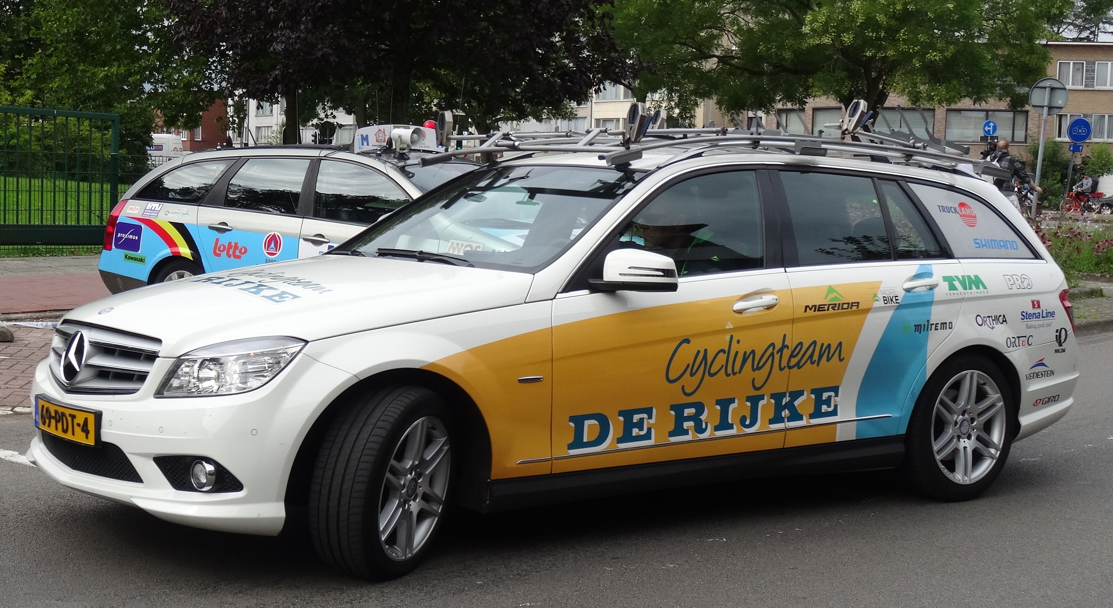 Reportage photographique réalisé le dimanche 10 août à l'occasion du départ et de l'arrivée de la Flèche du port d'Anvers 2014 à Merksem (Anvers), Belgique.